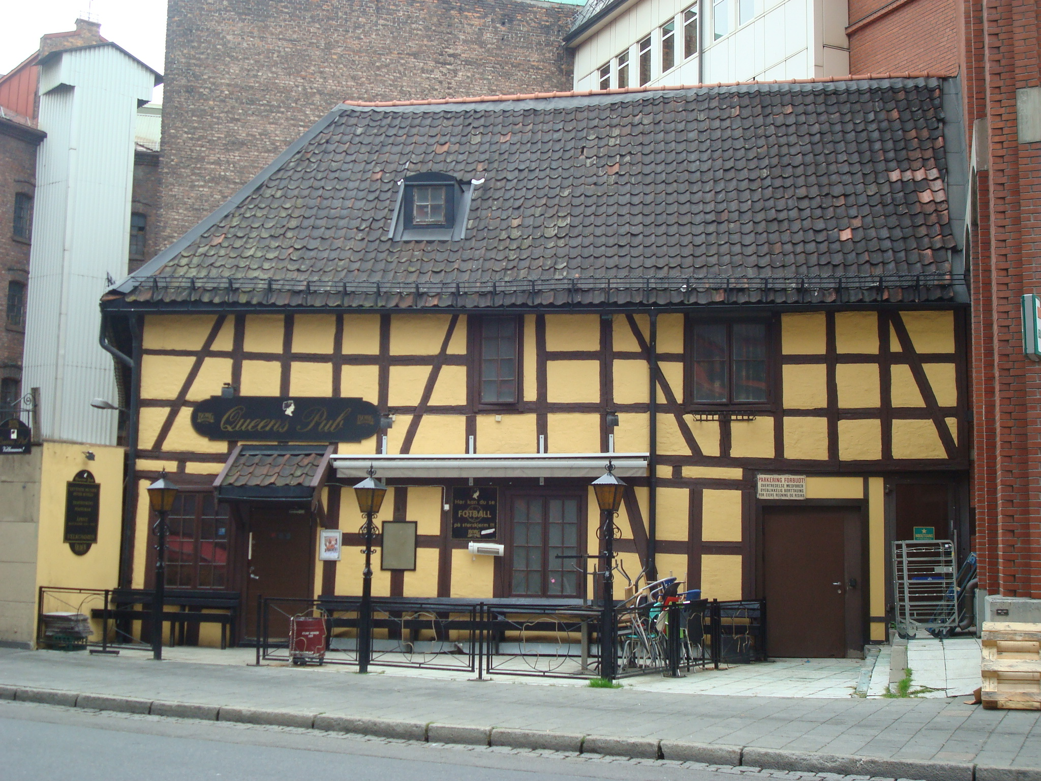 Brugata 14 i Oslo